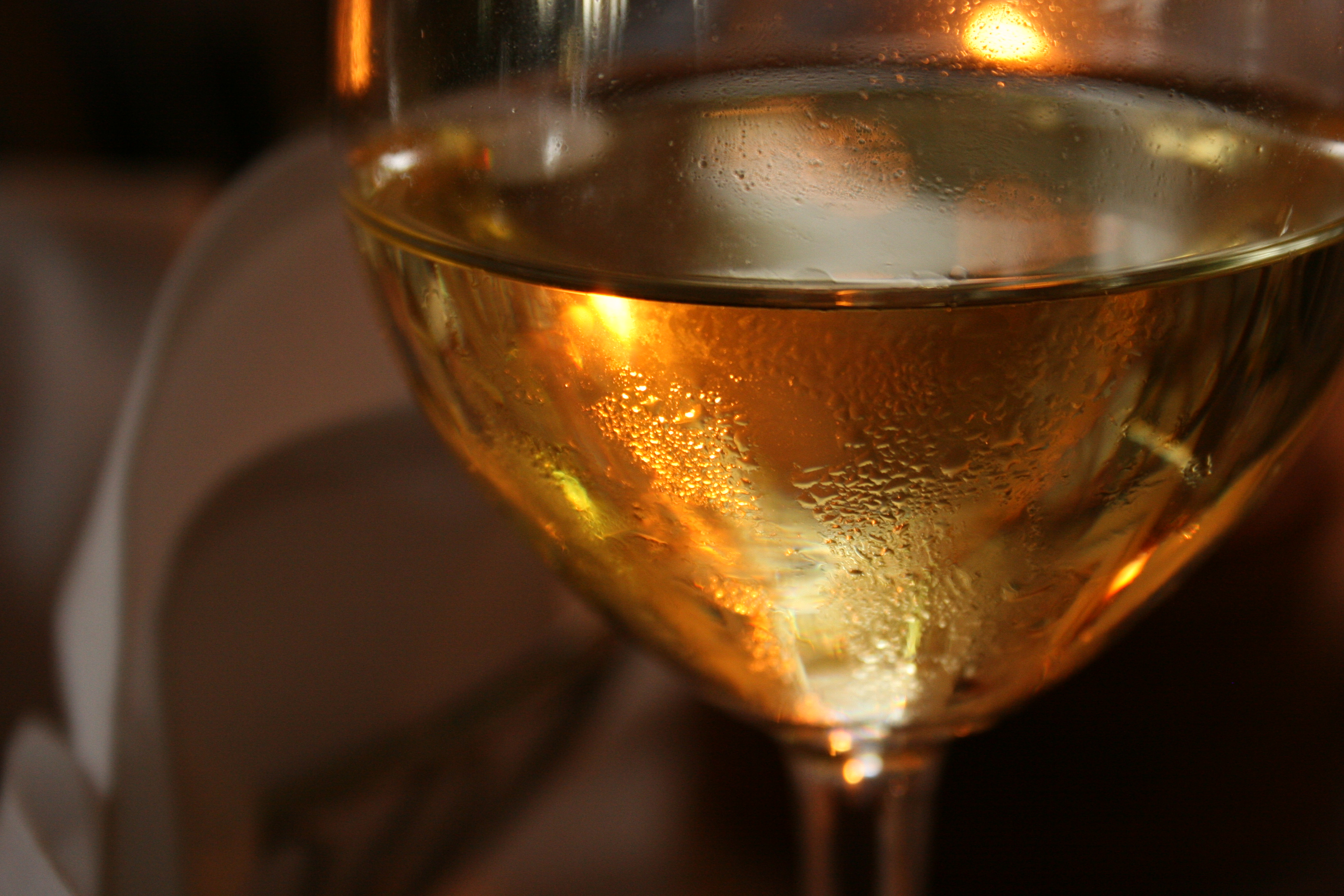 Wine Glass